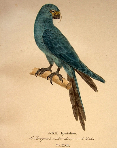 Spixara